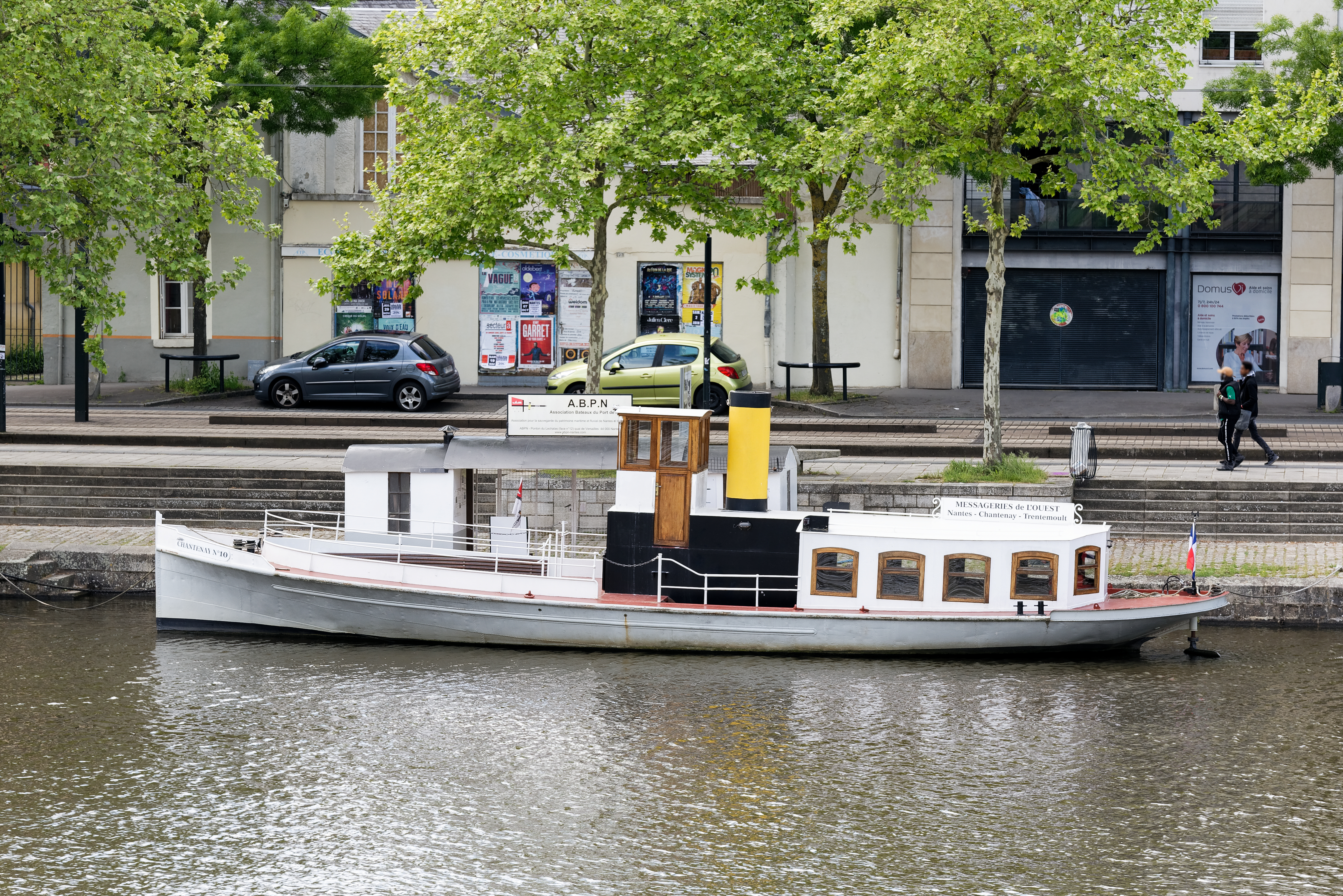 Le Chantenay (dernier roquio du port de Nantes. Propriété de l'Association Bateaux du Port de Nantes (ABPN). Vu depuis le quai Ceineray. (Nantes, Loire-Atlantique, Pays de la Loire, France)